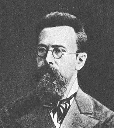 Nikolai Rimsky-Korsakov. Scan made by User:Ivan Velikii